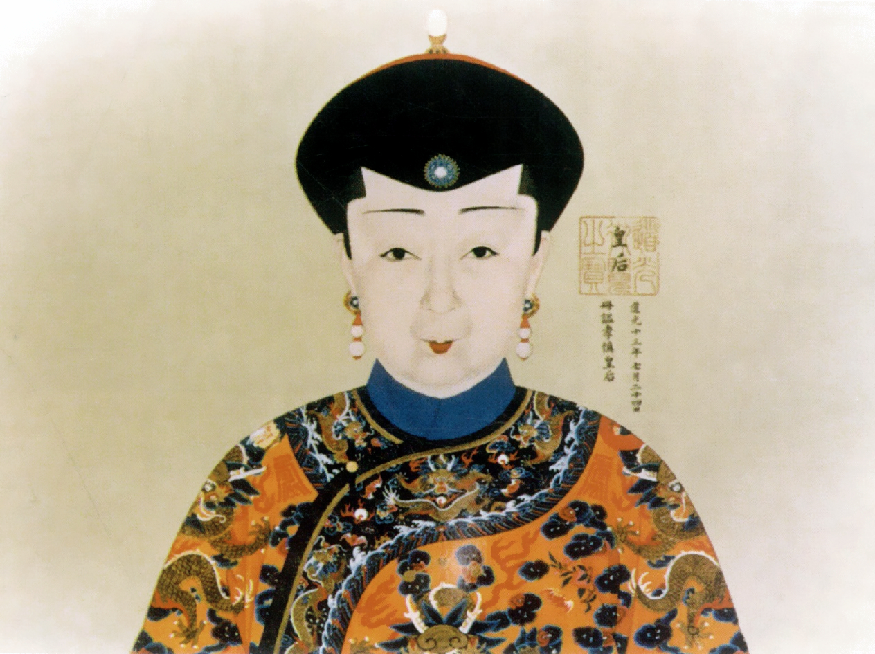 道光皇后肖像 aka Empress Xiaoshencheng